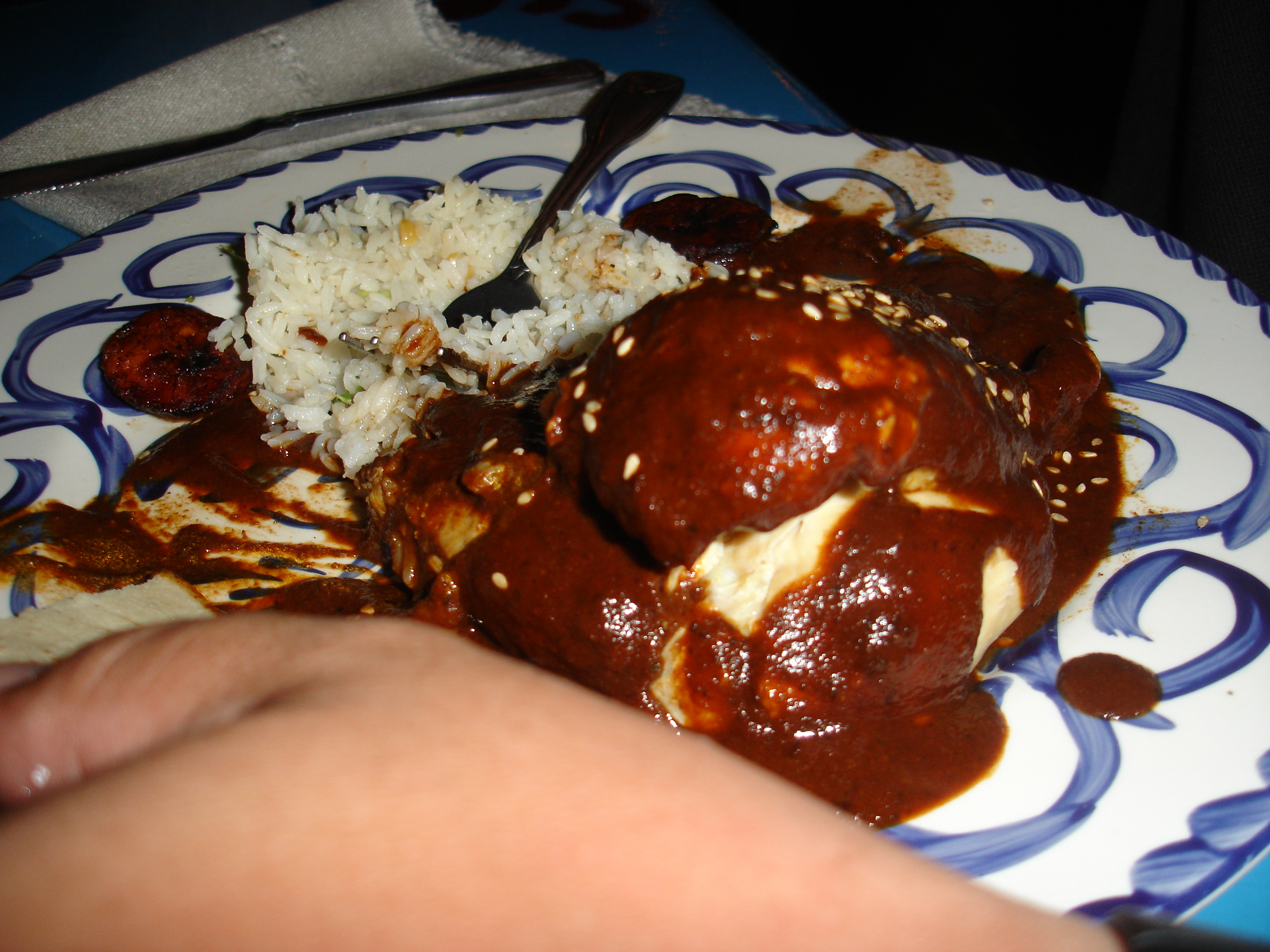 Mole poblano at Mi Casa, Cabo San Lucas, Baja California Sur, Mexico